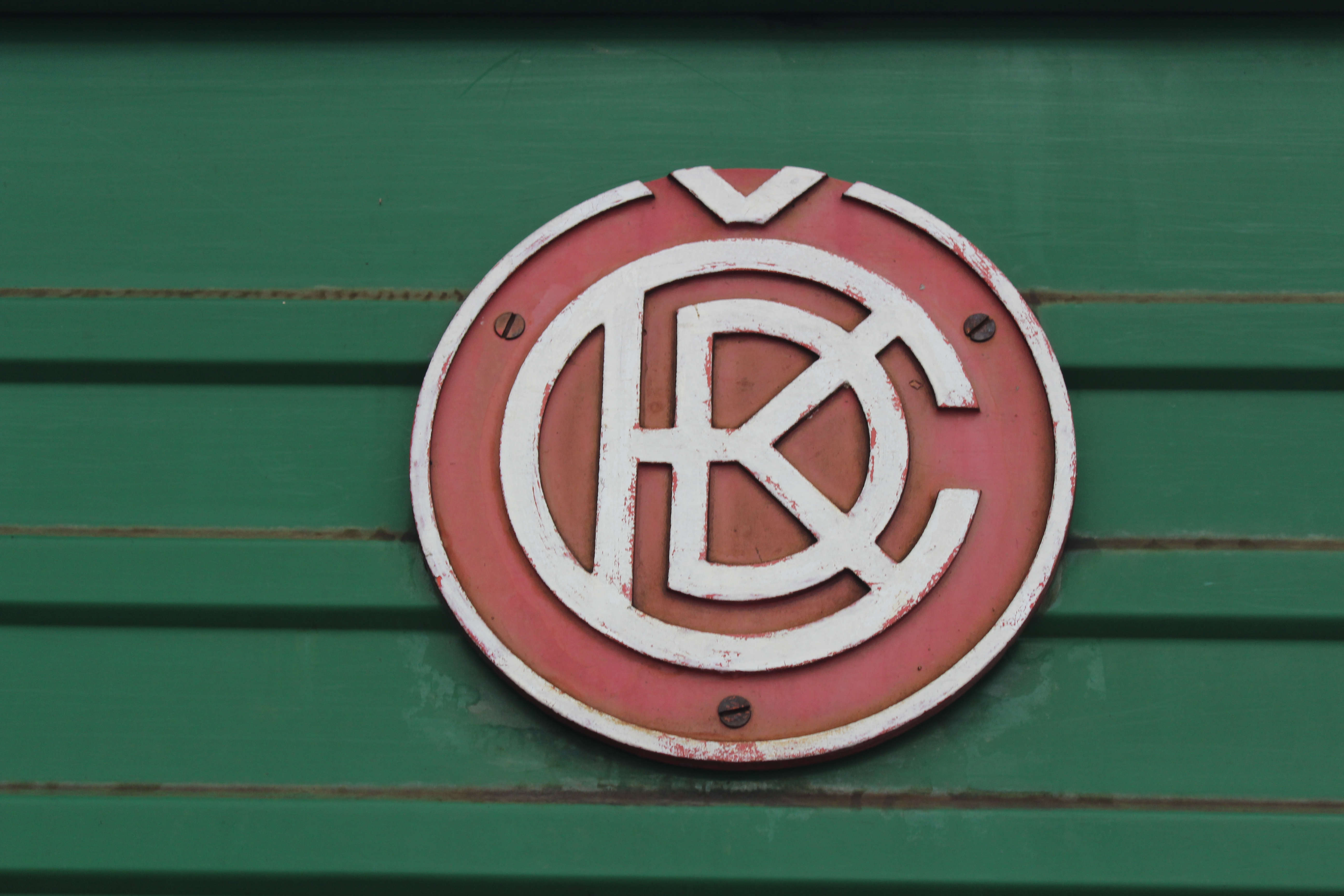 Motorová lokomotiva řady 751 nebo T 478.1 jak byla označována do roku 1988. Skříňová čtyřnápravová dieselová lokomotiva. Uspořádání pojezdu Bo- Bo . Označována přezdívkou Zamračená,nebo Bardotka podle charakteristických oken a tvarování čela lokomotivy. Podle zkušeností v provozu je považována za jednu z nejlepších lokomotiv ČKD Praha. ČKD ji vyrábělo v letech 1964 - 1971. Parametry elektrický stejnosměrný přenos výkonu, max. povolená rychlost 100 km/h, trvalá tažná síla lokomotivy 120 kN, maximální tažná síla 220 kN, hmotnost 75 tun. Část strojů byla v 90. letech vybavena zařízením pro elektrické vytápění vlaků a označována jako řad 749.